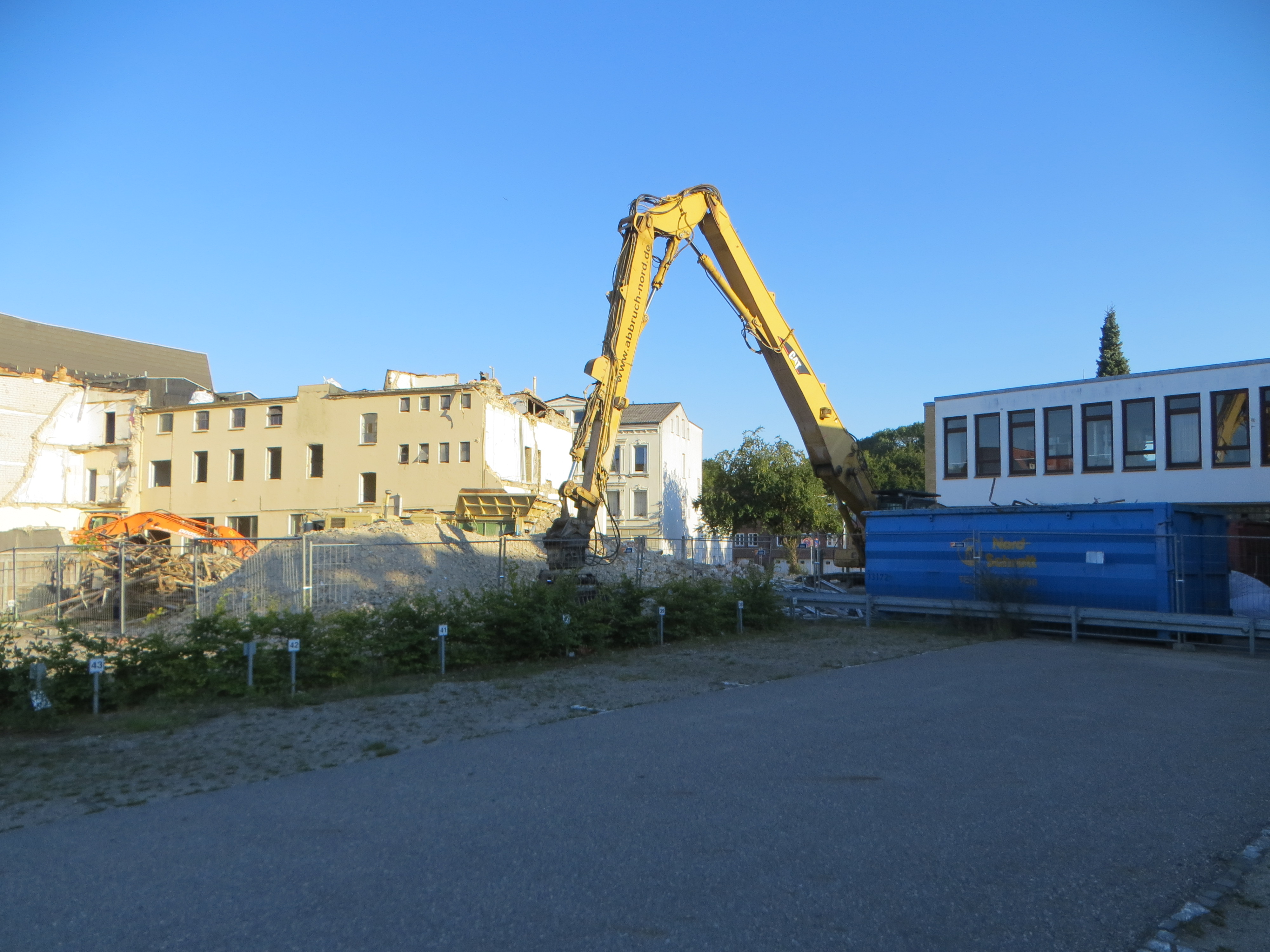 Abriss der alten Schokoladenfabrik (Flensburg, Bahnhofsviertel), Bild 01